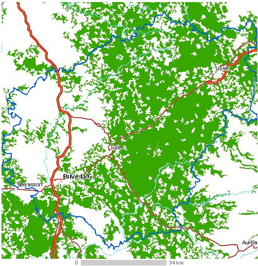 Carte du département Corrèze Légende